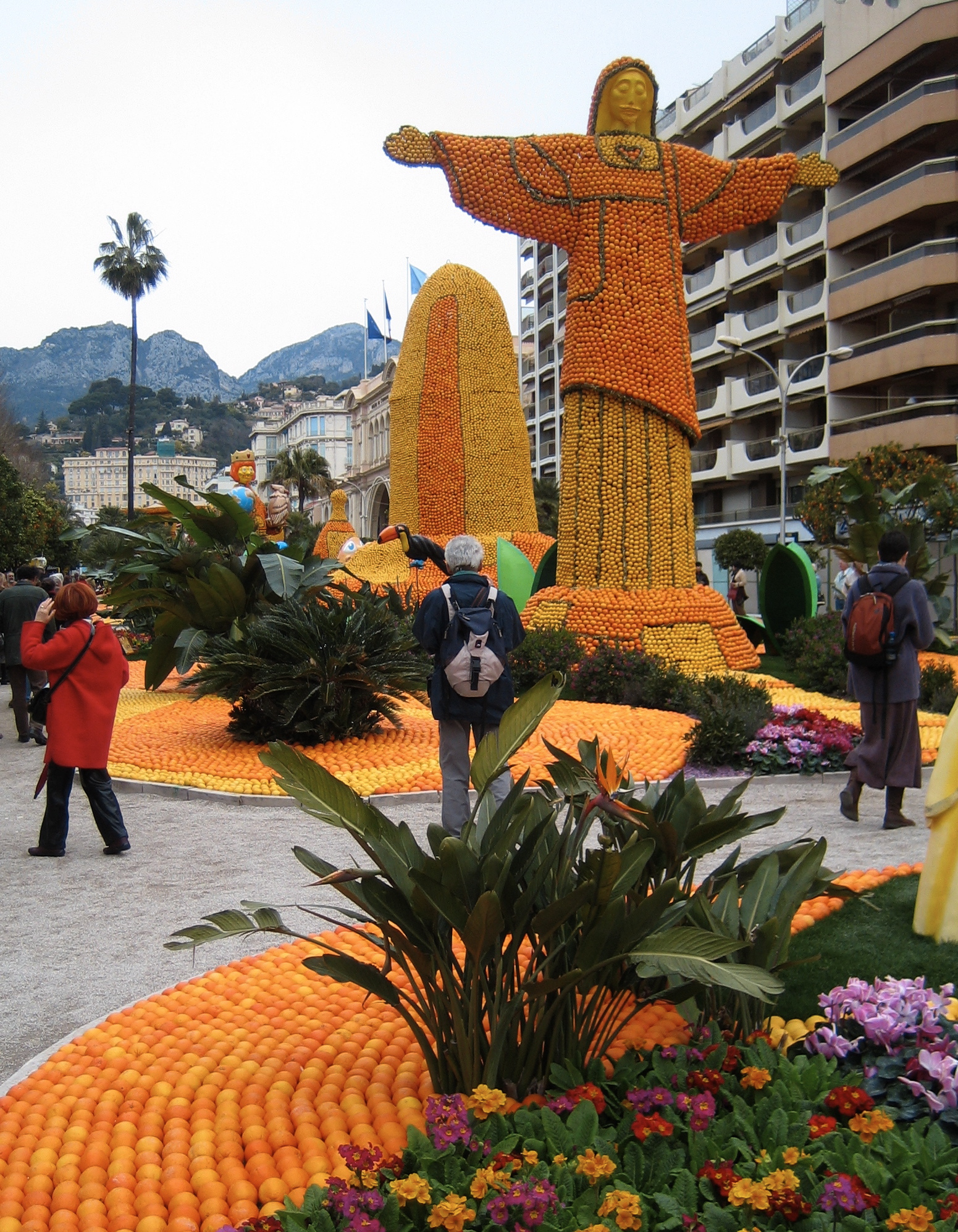 Fête du Citron